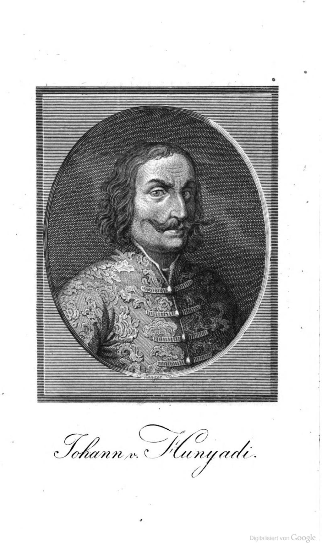 johann von Hunyadi